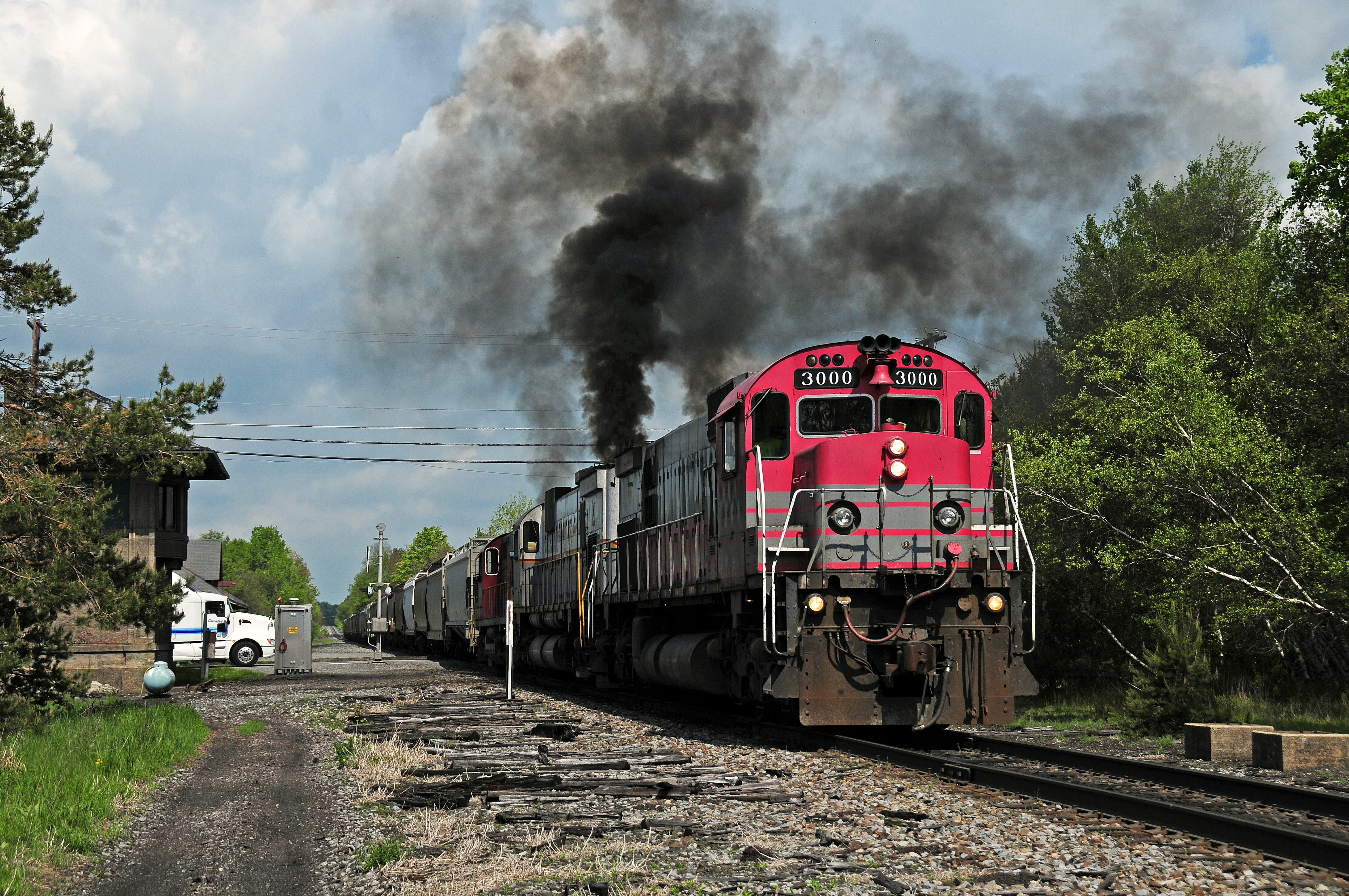 Delaware Lackawanna #3000 at Pocono Summit May 20, 2013